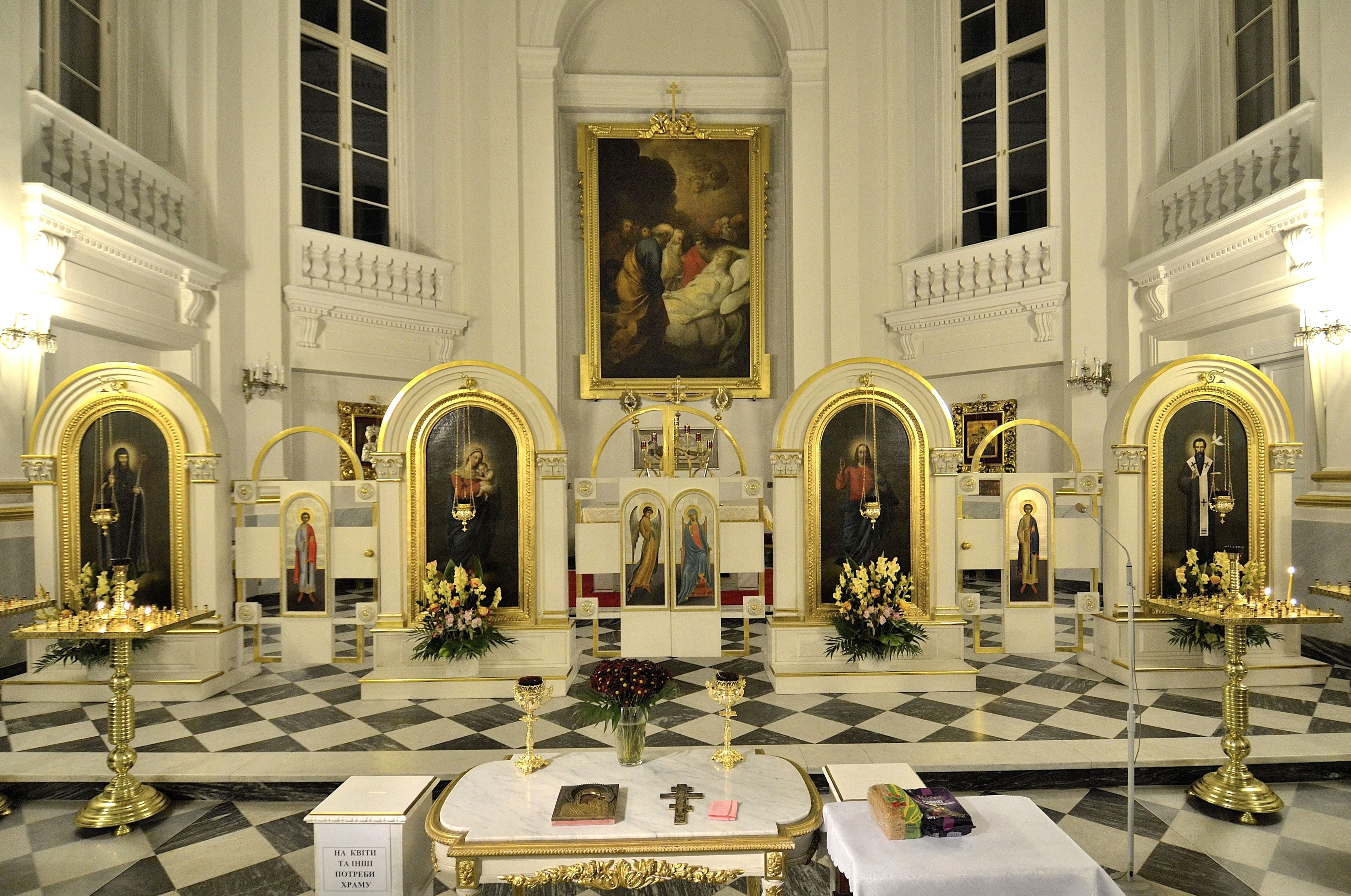 Grekokatolicka cerkiew Zaśnięcia Najświętszej Marii Panny w Warszawie